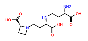 Estructura molecular 2D de la Nicotianamina